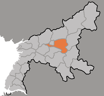 Map of Bukchang, Pyongan-namdo, DPRK, 2006